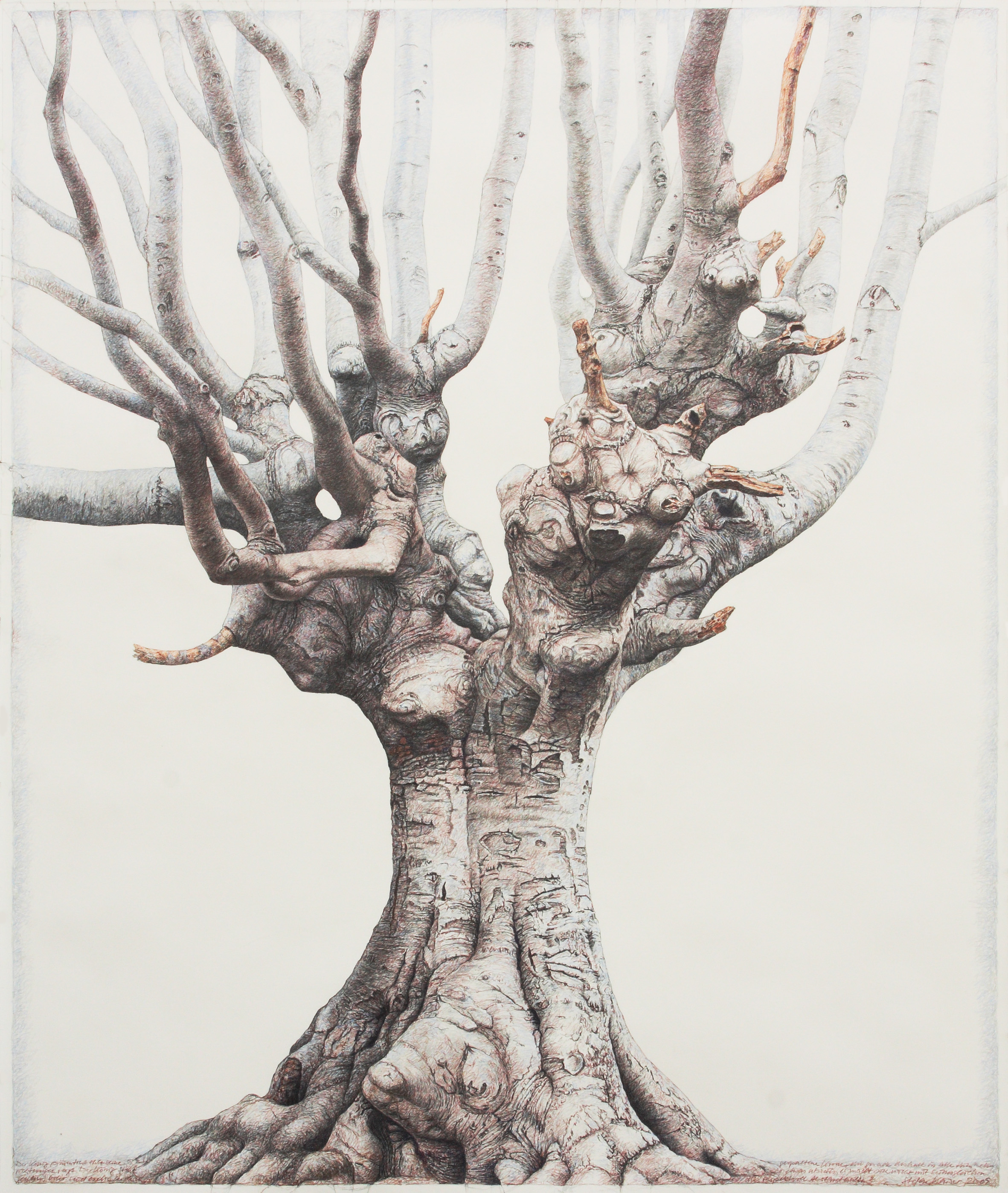 Zeichnung Der König aus dem Jahr 2009 von Stefan Kaiser